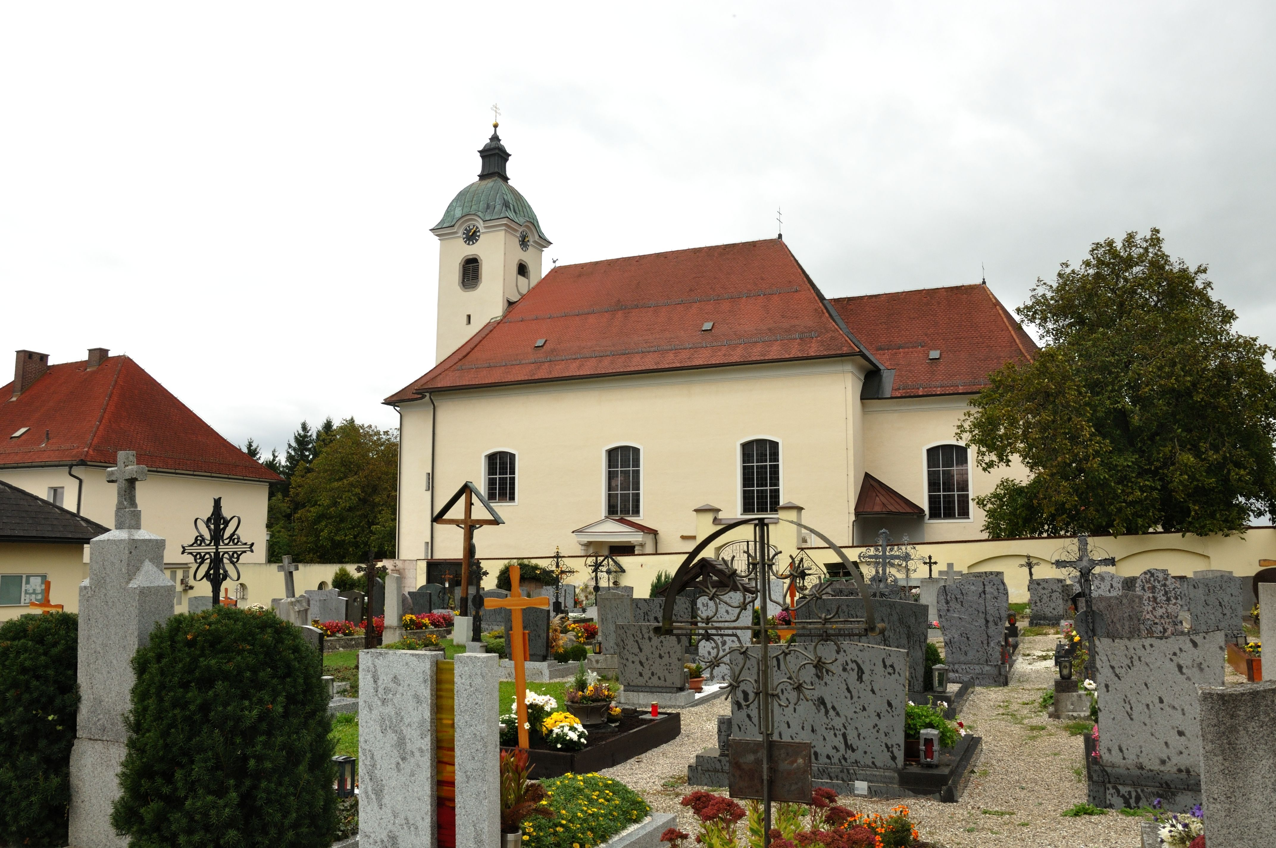 Kath. Pfarrkirche Mariä Verkündigung